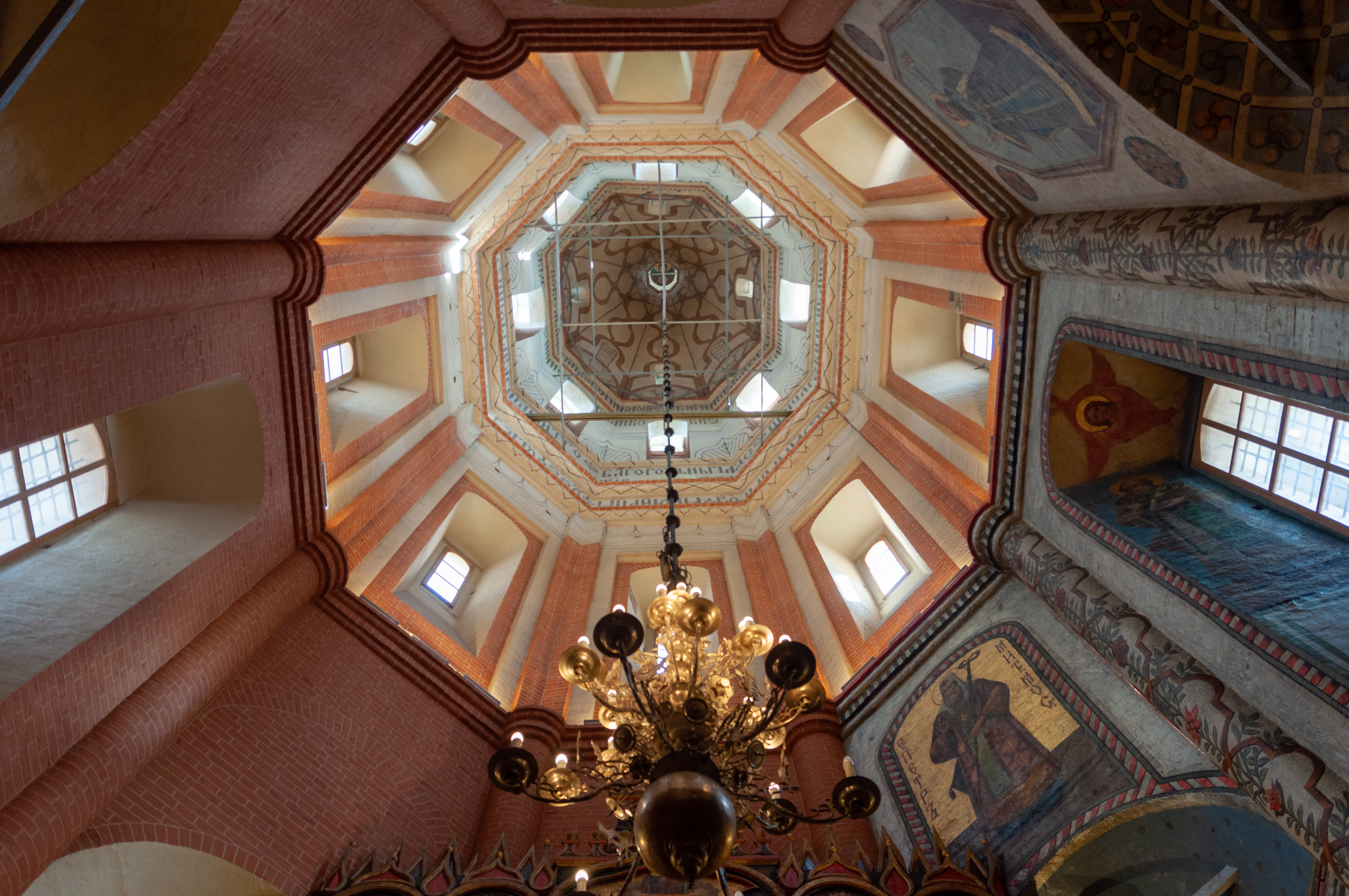 Intérieur de la cathédrale Saint-Basile à Moscou